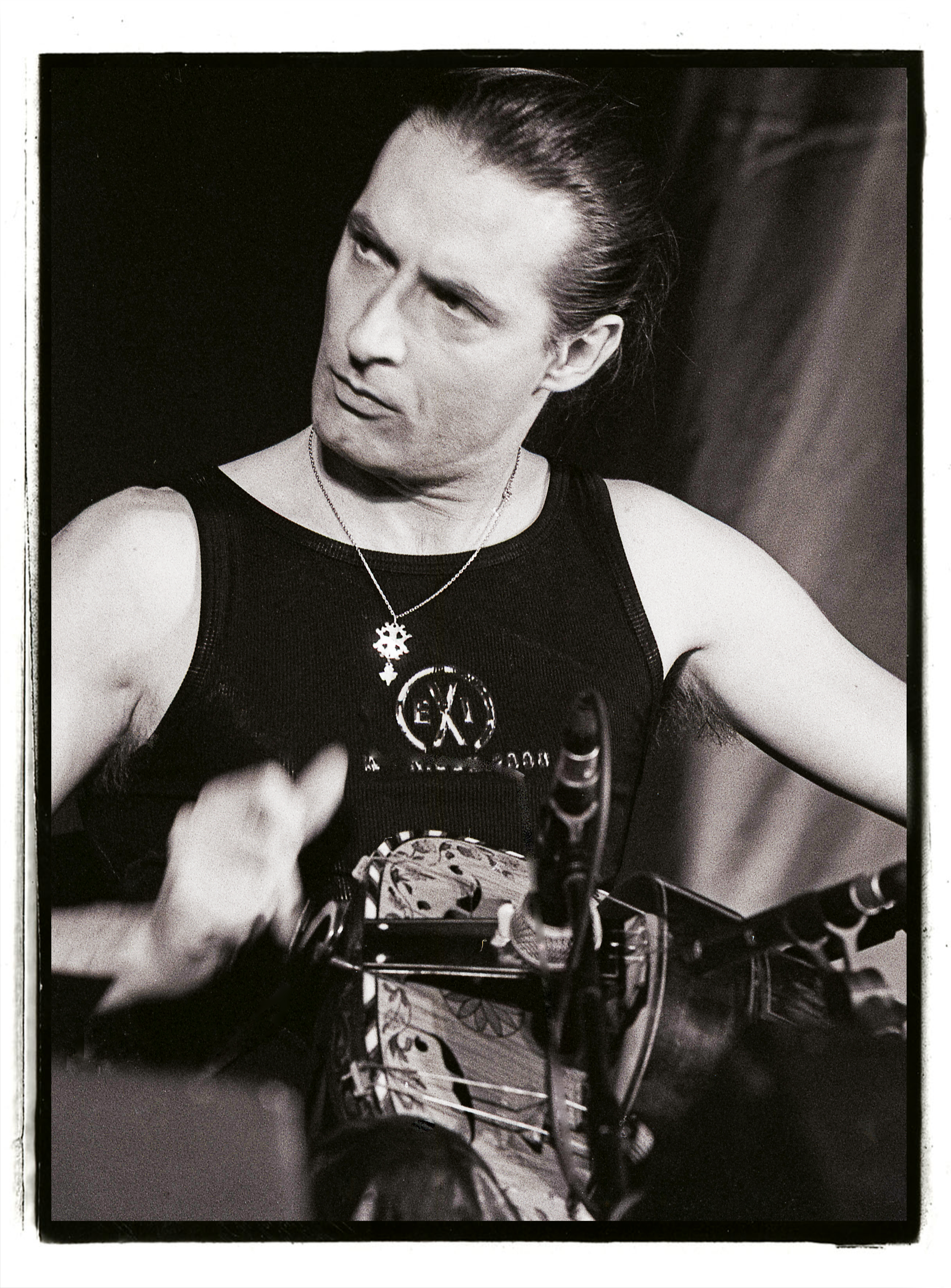 patrick bouffard en trio